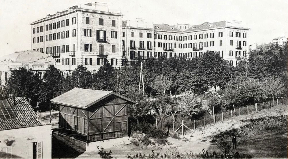 Salsomaggiore Terme - Grand Hotel des Thermes